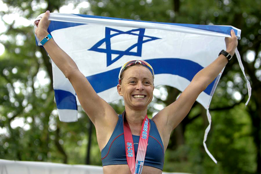 זוהי תמונה שצולמה על ידי בתחרות איש הברזל בניו יורק באוגוסט 2012